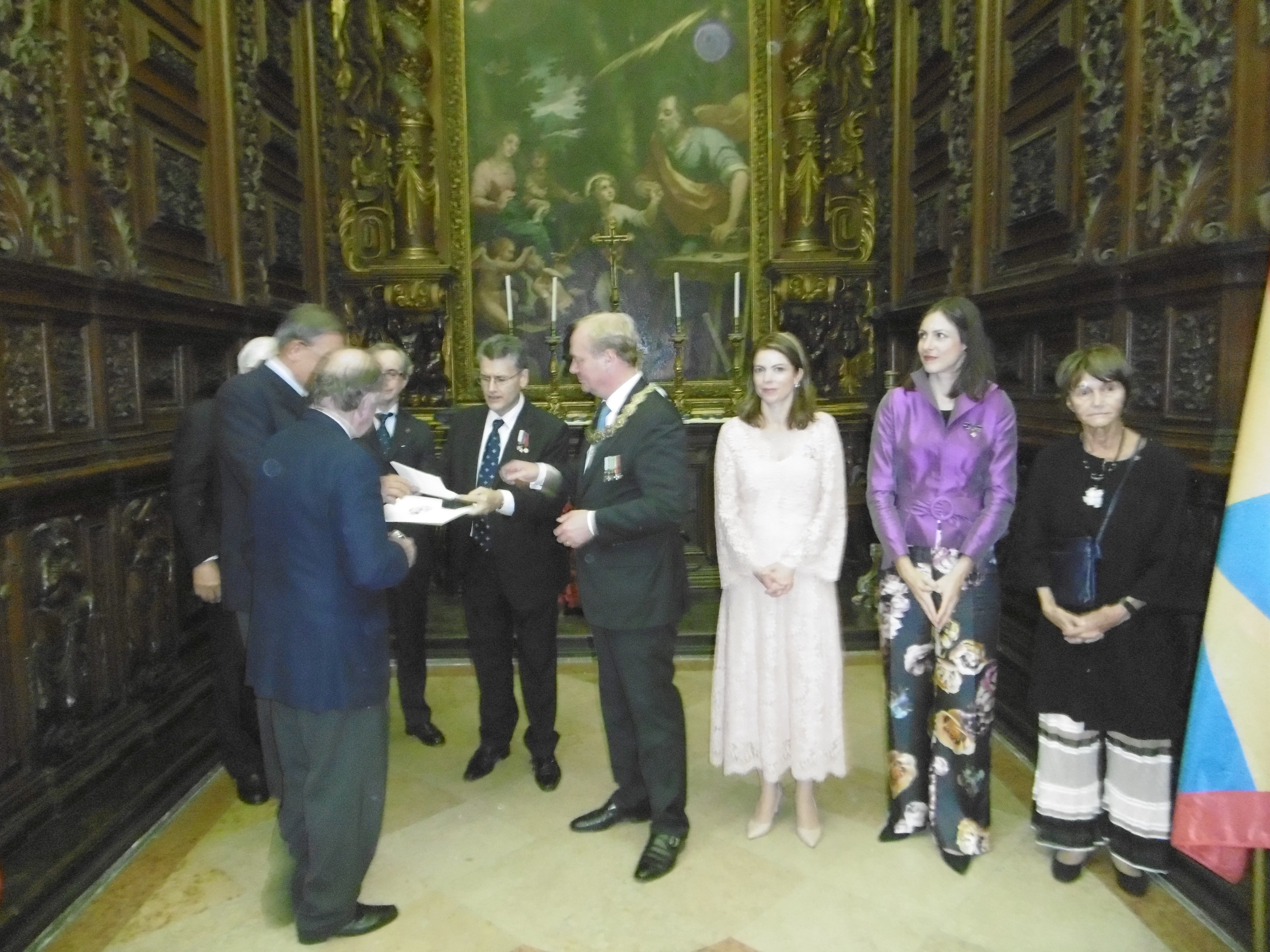 Il principe Carlo Saverio di Borbone-Parma con la moglie e la cognata